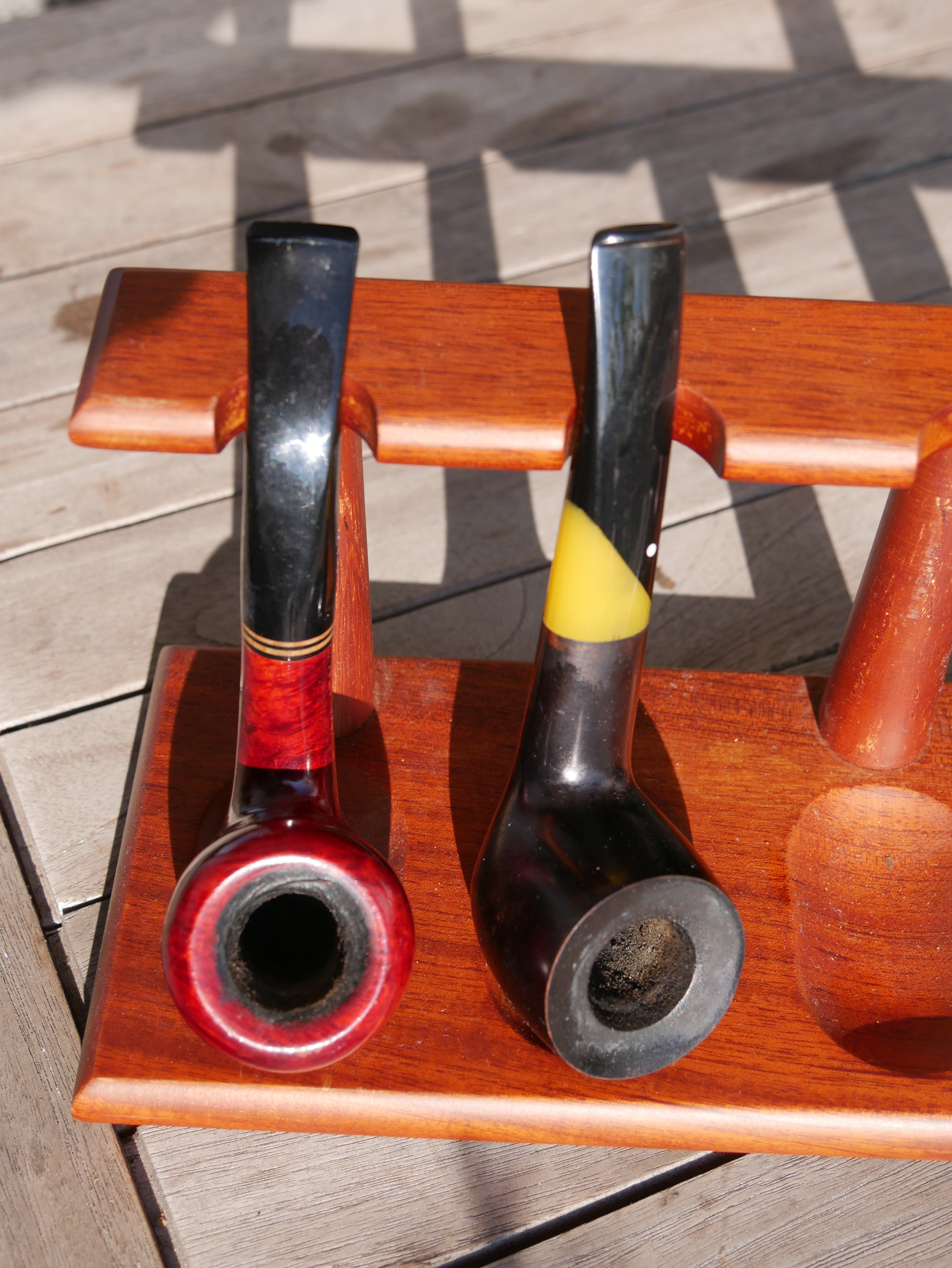 2 Pfeifen der Marke Vauen auf einem Pfeifenständer aus Holz